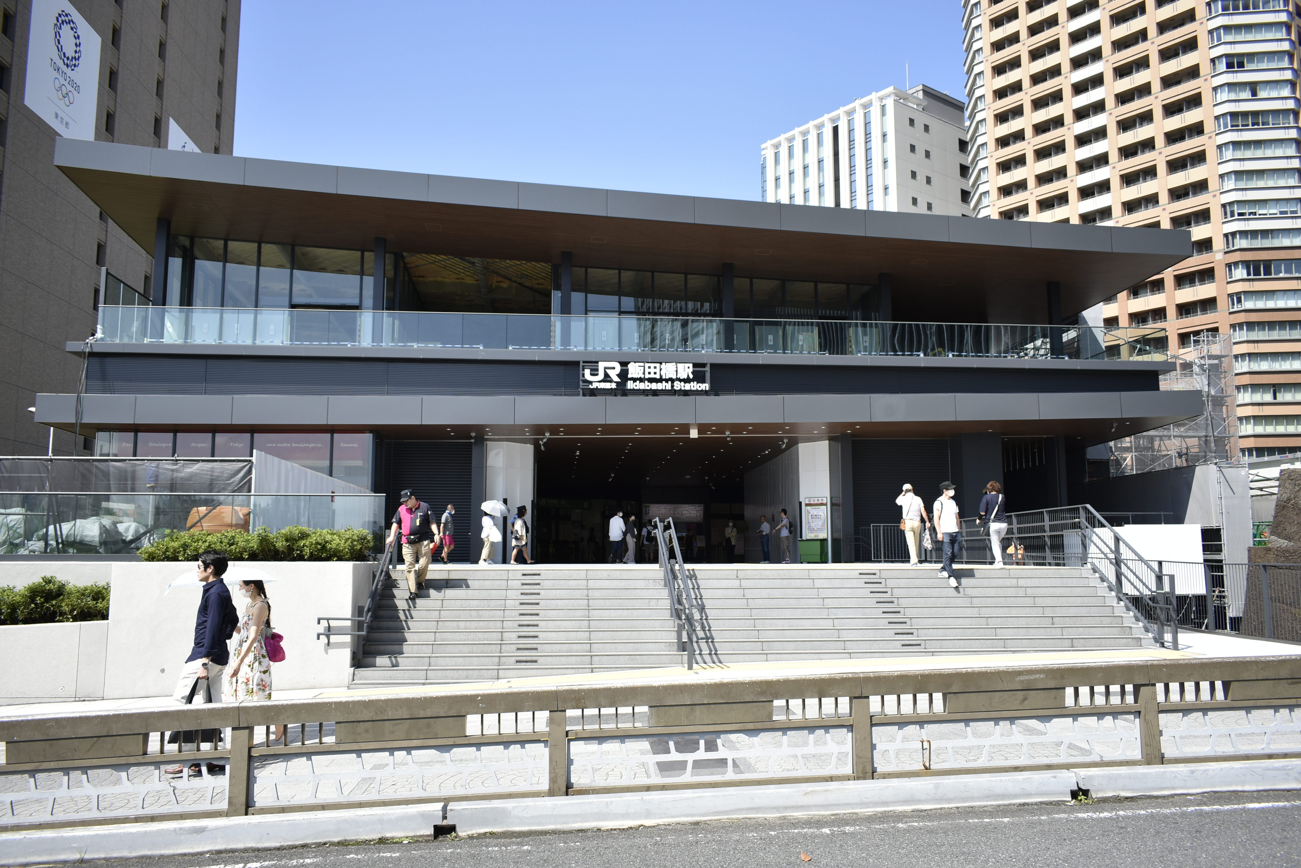 飯田橋駅 新駅舎